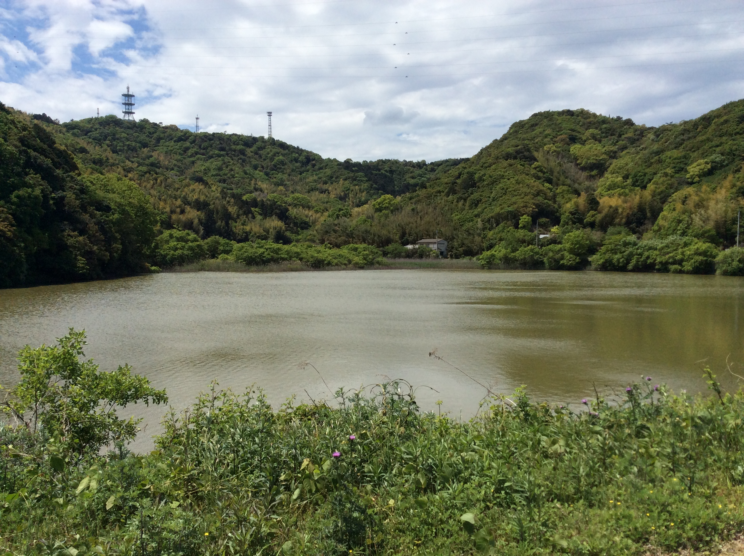 黒崎池のほとりから見た金光山